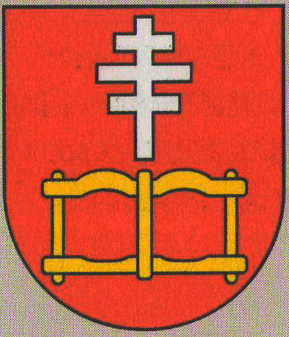 Erb obce Hunkovce: (HR H -168/2004):V červenom štíte je zlaté dvojité jarmo, prevýšené strieborným ortodoxným krížom.